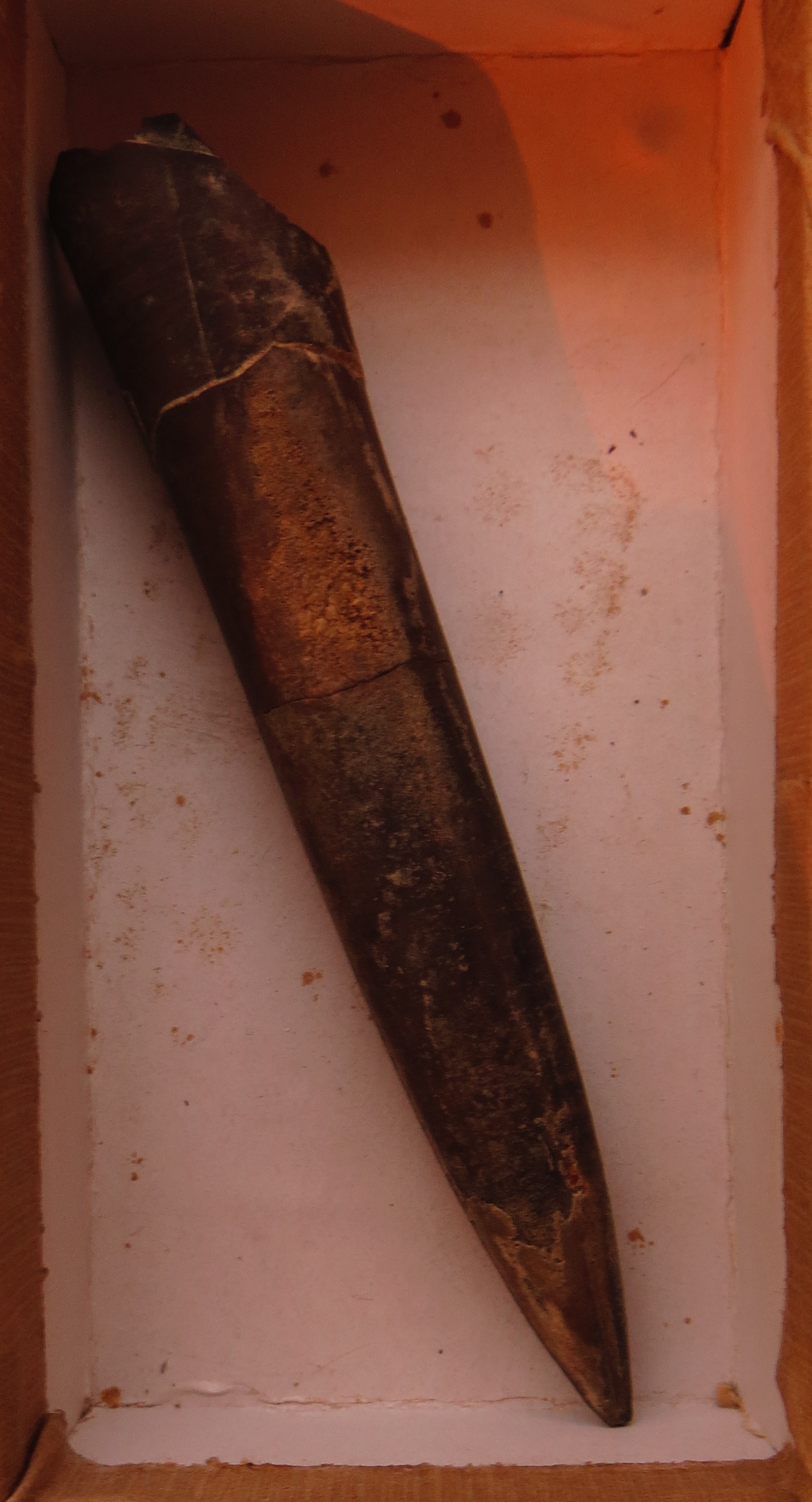 Took the picture at Natural History Museum in Bamberg